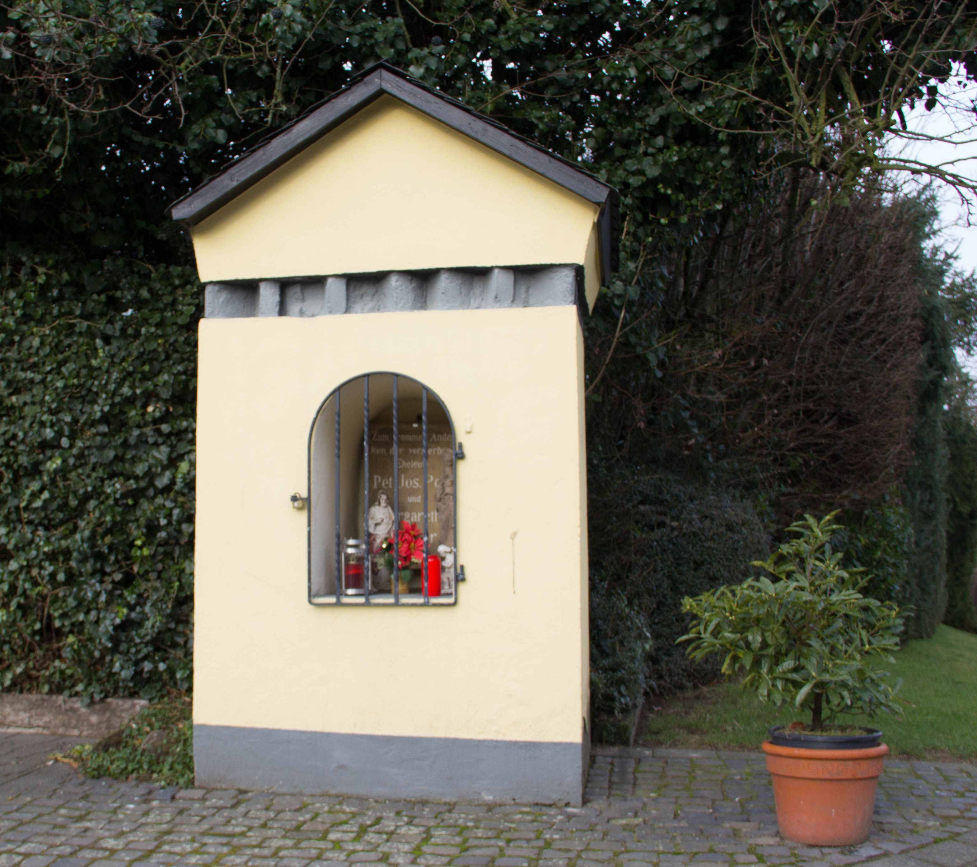 Heiligenhäuschen in Deesem: Oberdorfstraße Ecke Mittelstraße